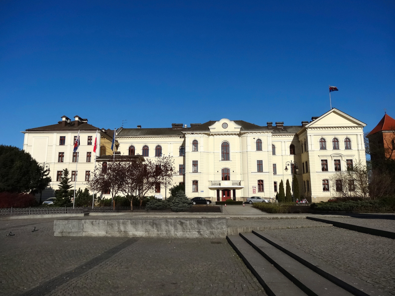 Ratusz w Bydgoszczy, dawne kolegium jezuickie (XVII w.), widok od Starego Rynku